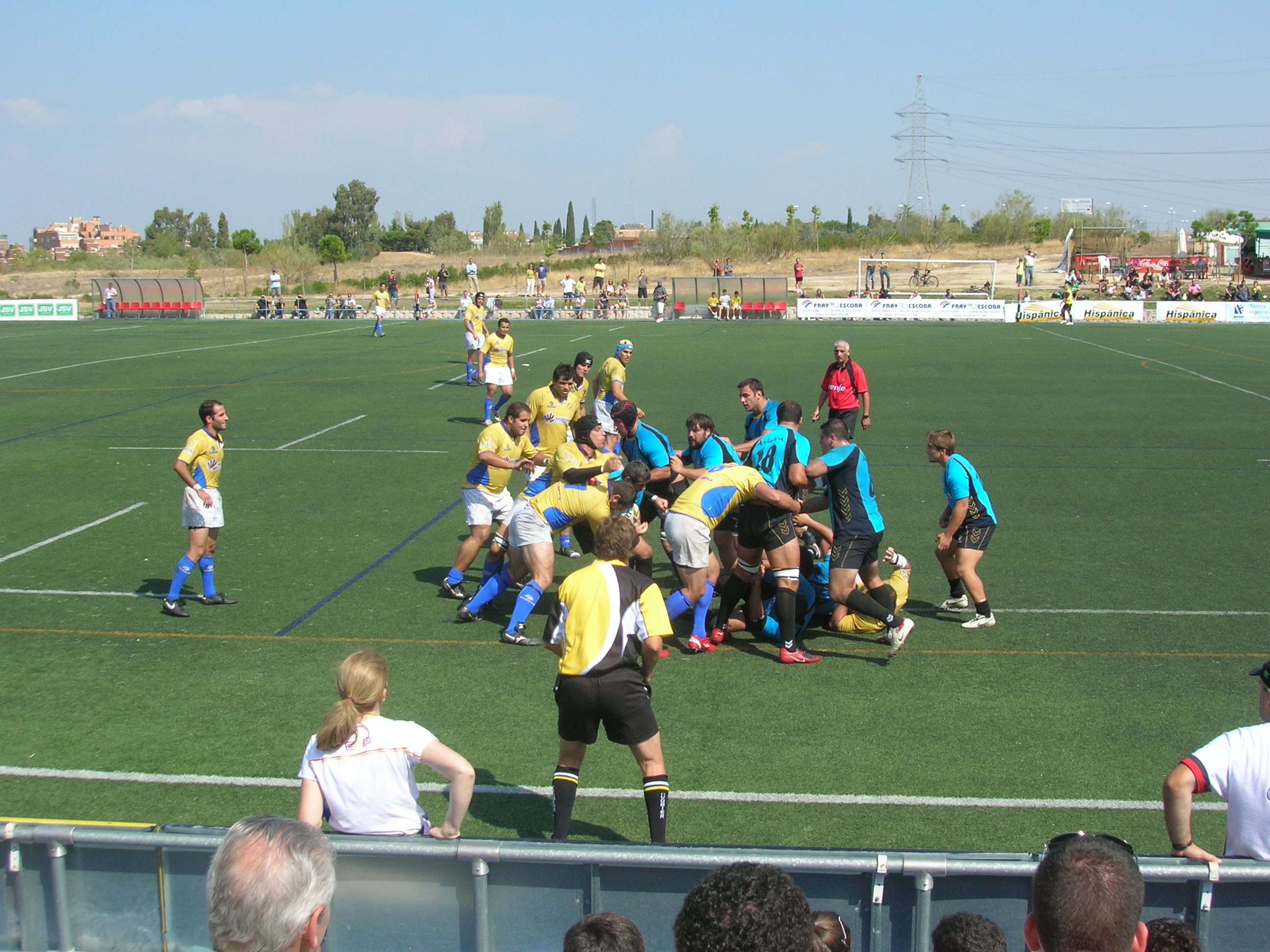 Mele en partido de División de Honor de rugby. CRC-Cajasol Ciencias